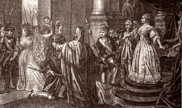 «Восшествие на престол Елизаветы Петровны»